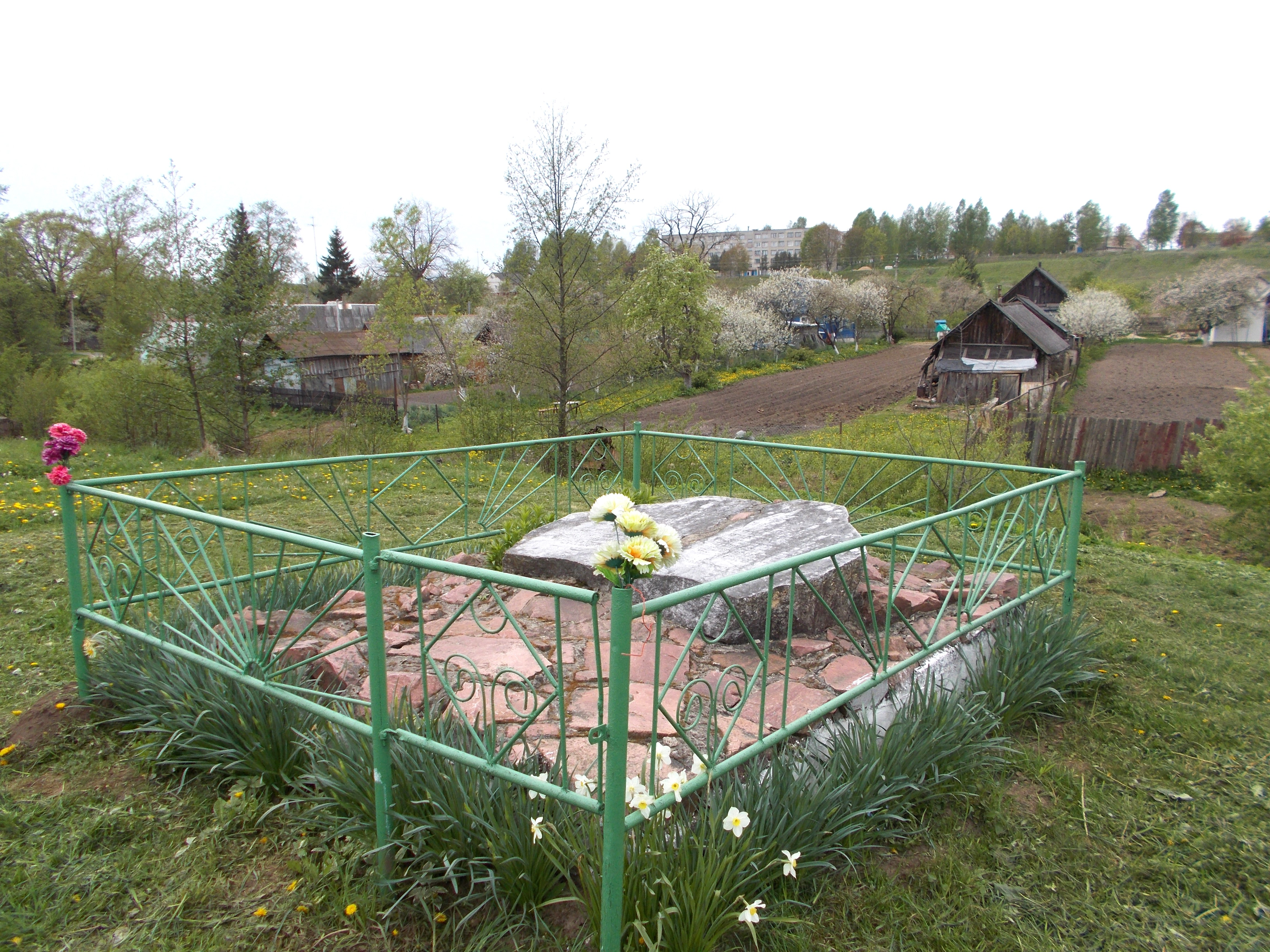 Памятник в Воложине на месте массовых убийств местных евреев во время Холокоста с надписью на русском языке и на иврите: "Памятник евреям г. Воложина, замученных фашистами. 3600 мужчин, женщин и детей было уничтожены фашистами и их пособниками в 1941, мае 1942 и сентябре 1942 годов. Священна их память." Памятник находится на территории ОАО "Воложинское агропромэнерго" на улице Пушкина, 53а.